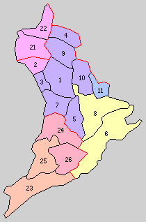 後の鹿児島県肝属郡域の町村制時点の町村。